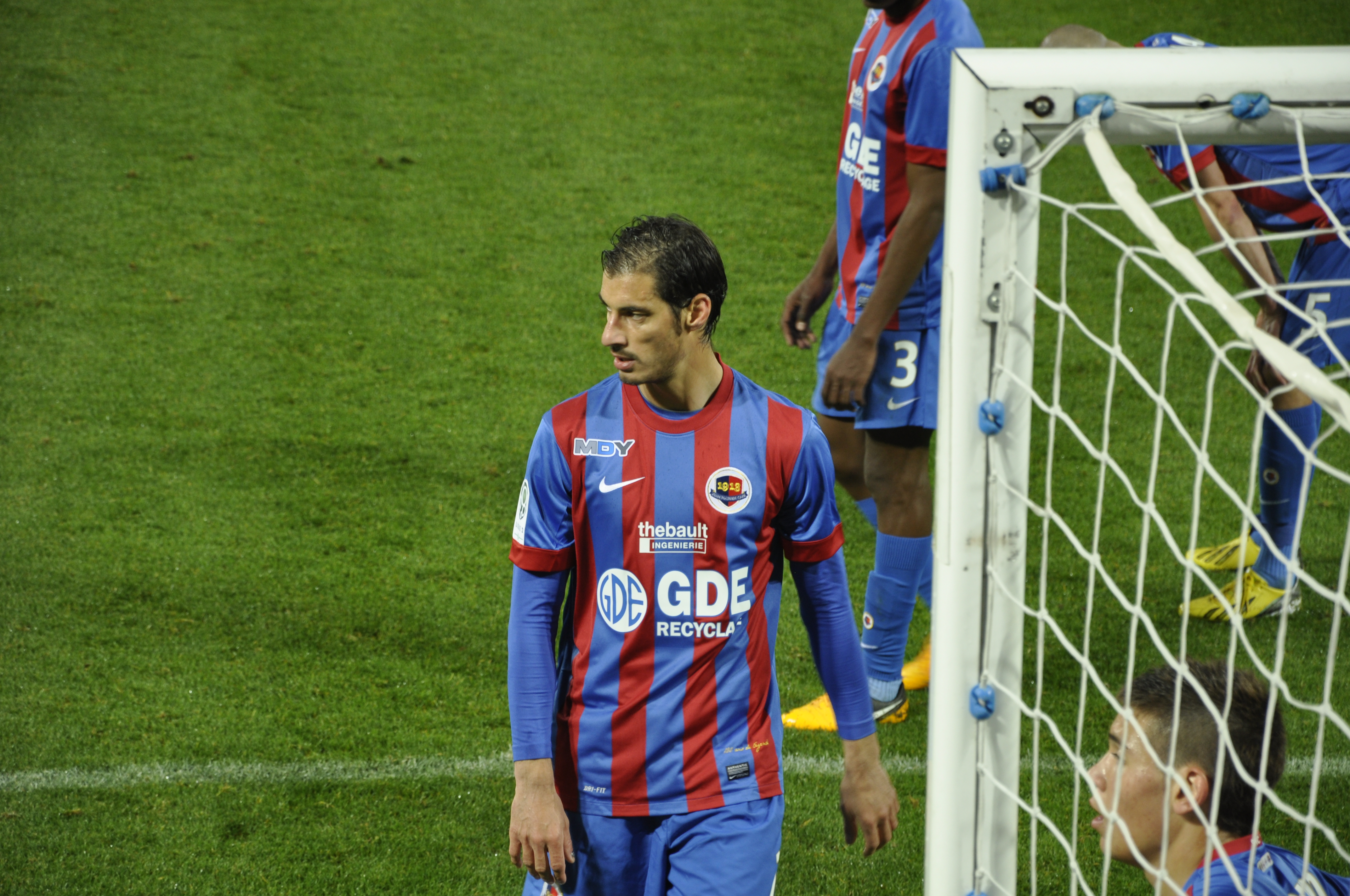 Nicolas Seube lors de son 377e match sous les couleurs du Stade Malherbe